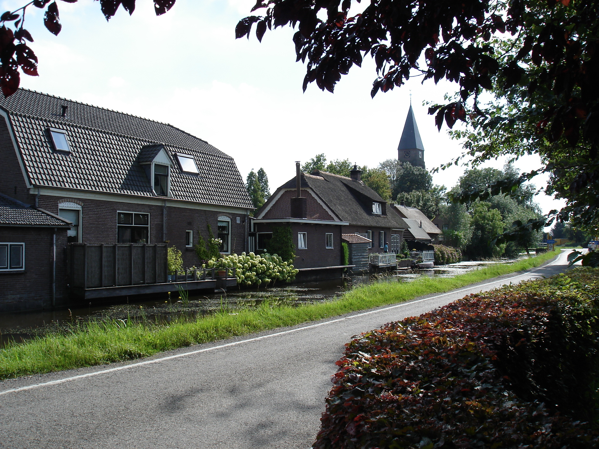 Cabauw en de Jacobuskerk.